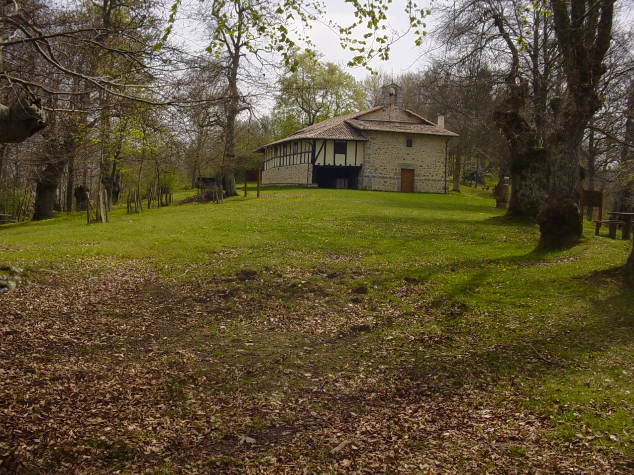 Jugatxi baseliza, Zuia.